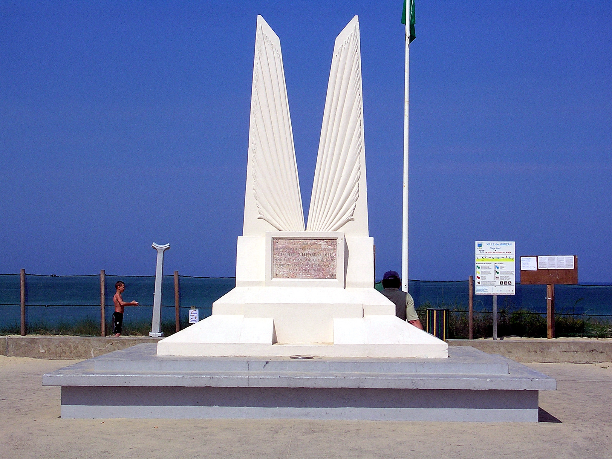 Mimizan, Les Ailes, commémorant l'atterrisage sur cette plage le 16 juin 1929 de l'Oiseau Canari, piloté par Assolant, Lefèvre et Lotti